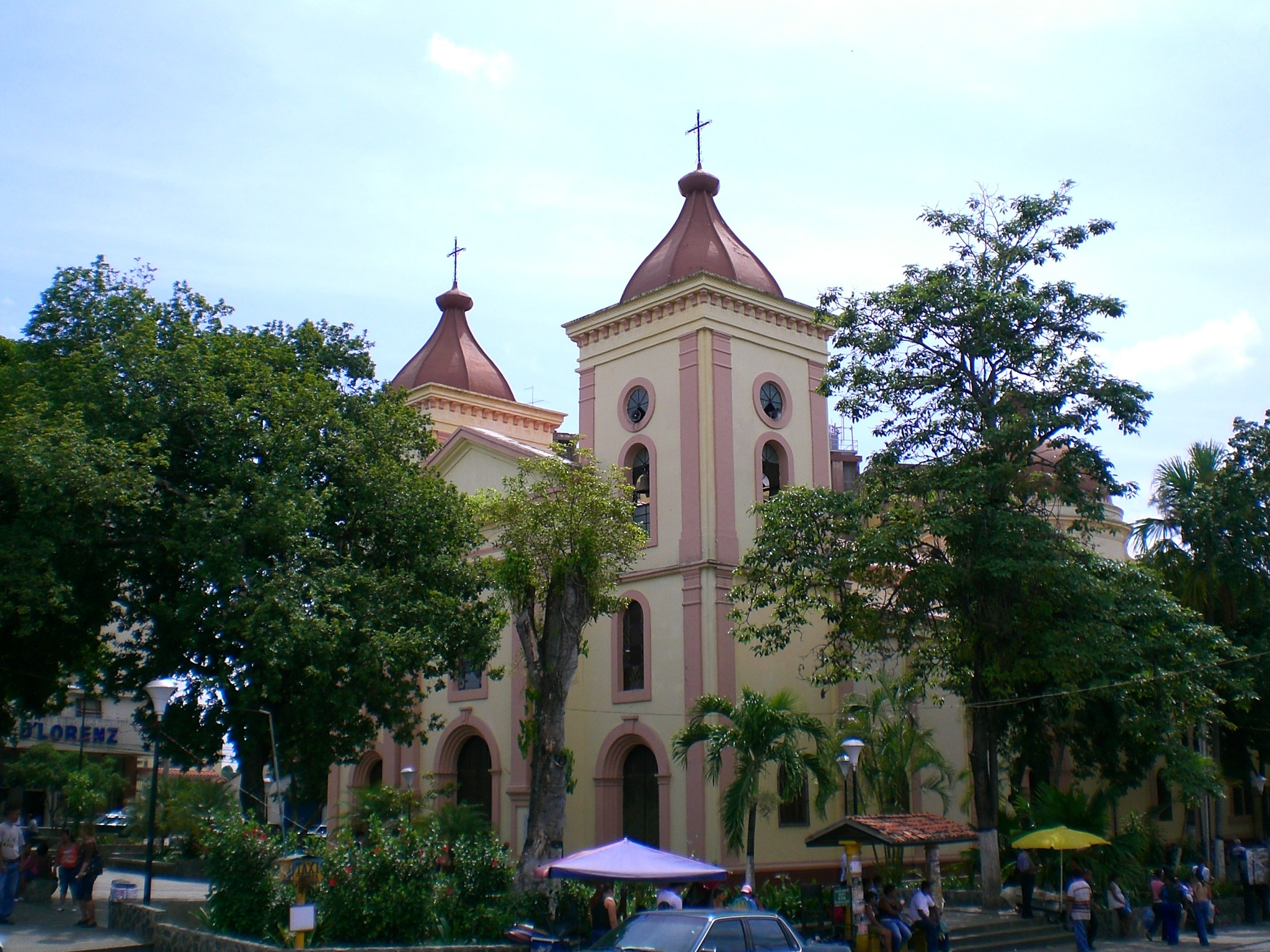 Nuestra Señora del Rosario de Cúa Church, Cúa, Venezuela